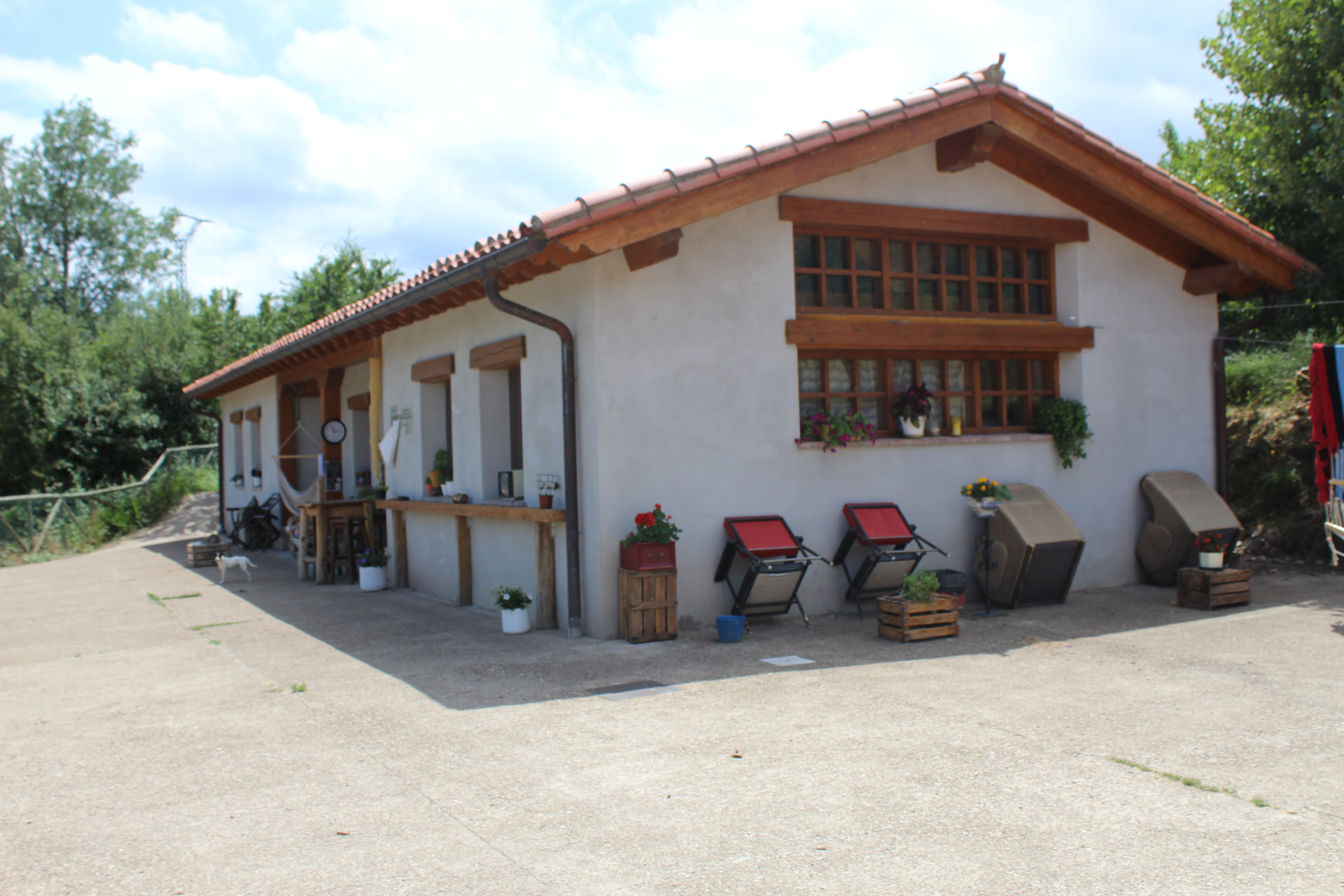 Edificio cultural donde La vida es sueño realiza conciertos, cursos y talleres en San Román de Cameros